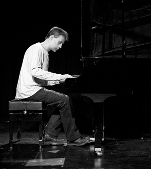 Foto de Pedro Reguillo